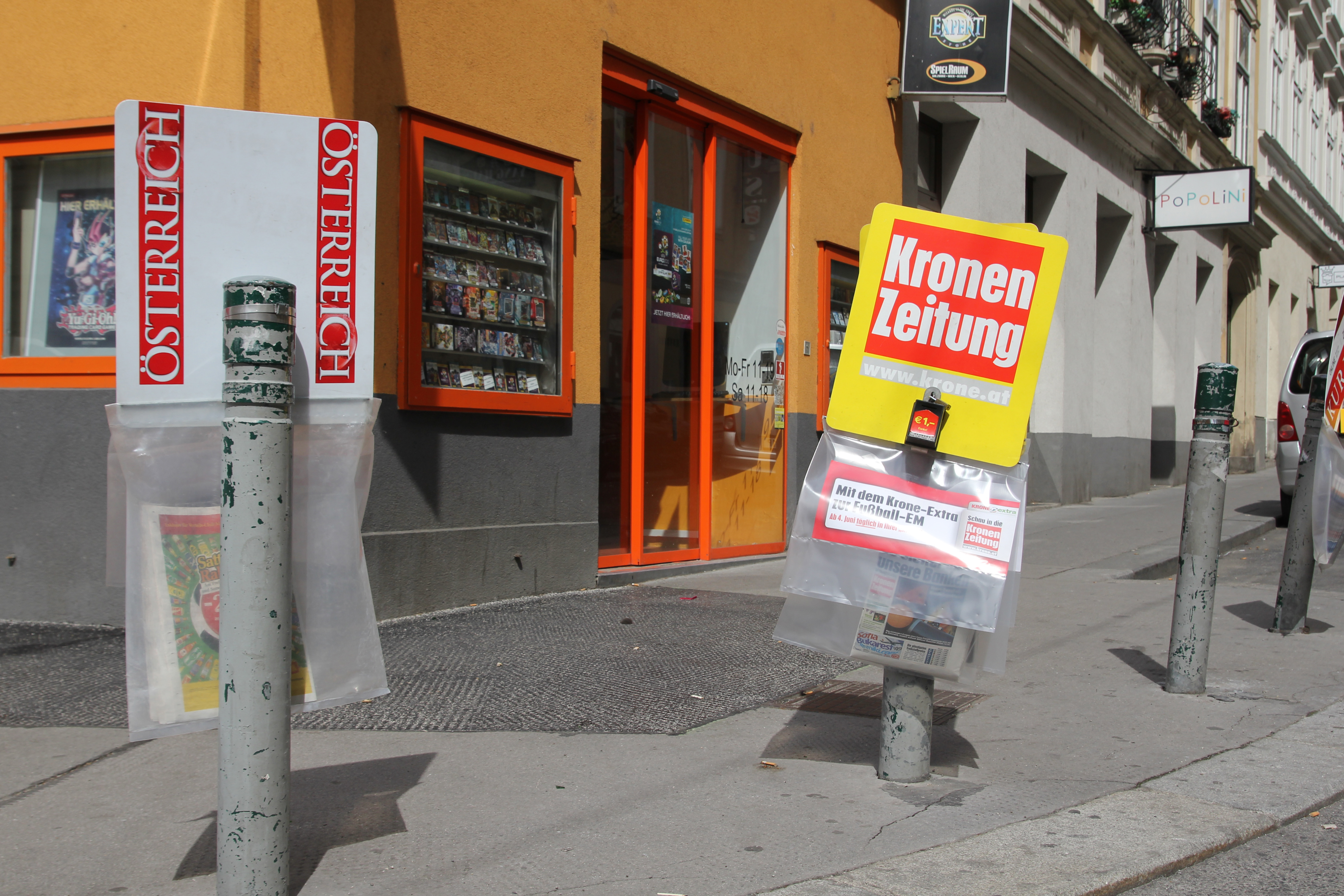 Sontagsstandl für den Zeitungsverkauf in Wien, Otto-Bauer-Gasse#Schmalzhofgasse